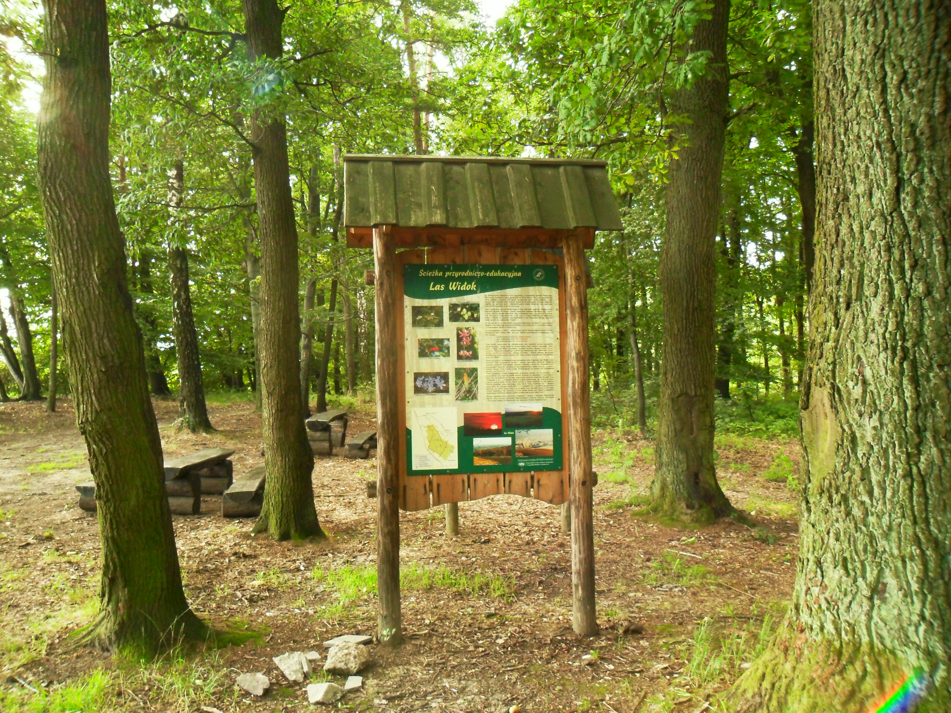 Las Widok w Raciborzu-Brzeziu